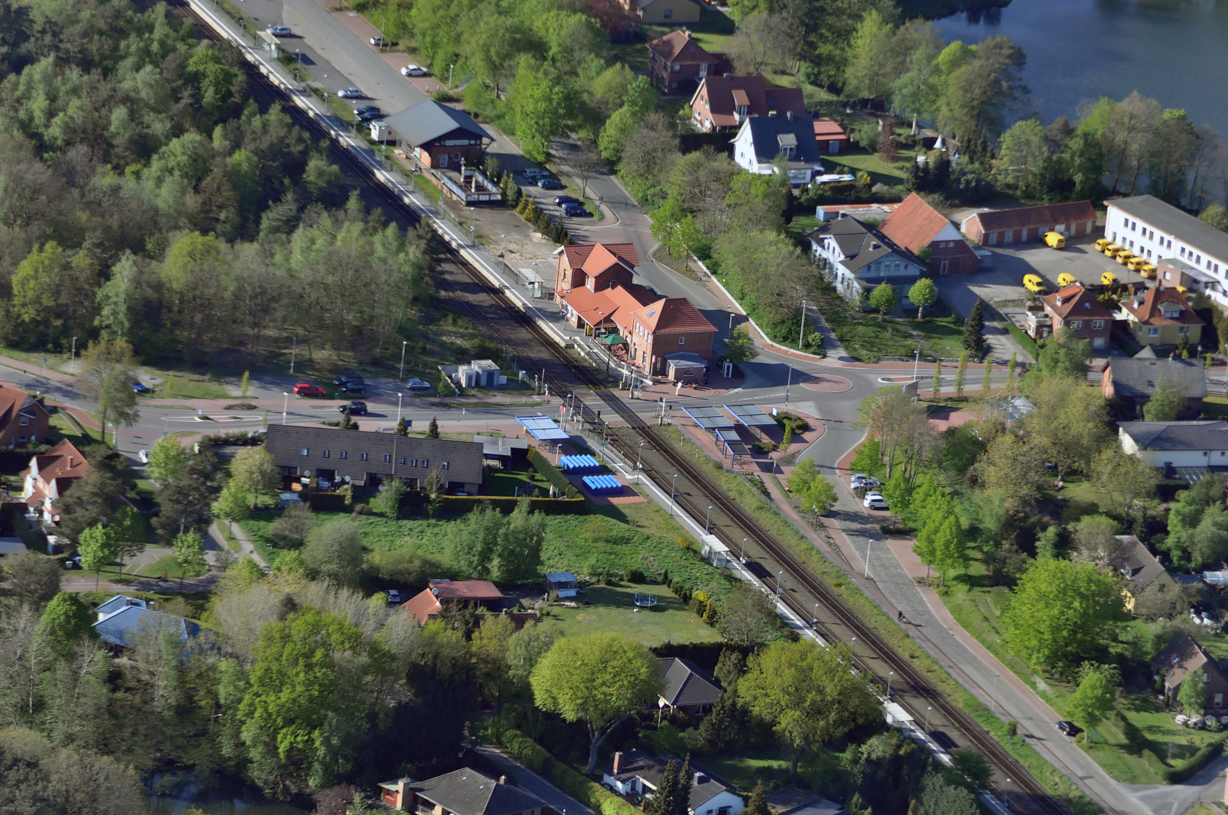 Luftbilder von der Nordseeküste 2012-05